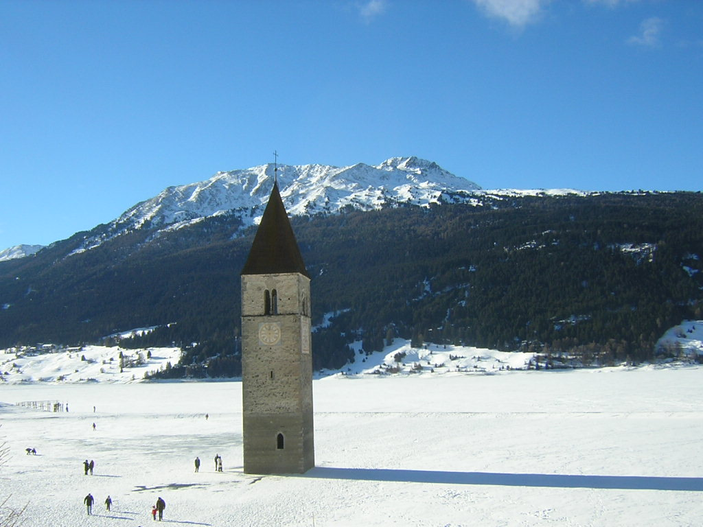 Der Kirchturm von Alt-Graun im Winter, im Hintergrund der Zehner